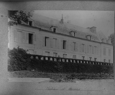 Carte postale du Château dans les années 1880